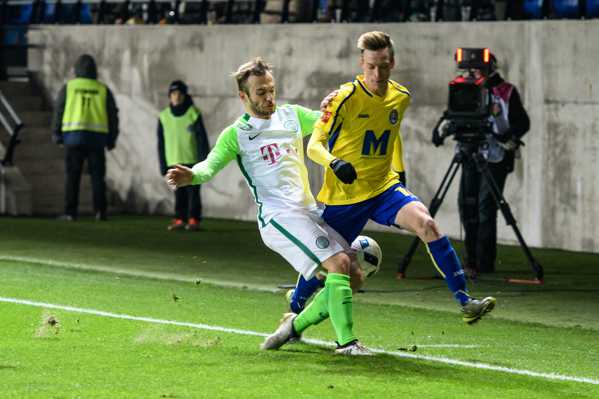 Lovrencsics Gergő szerelése a Magyar Kupa 2016-17-es kiírásának 8. fordulójában a Pancho Arénában.